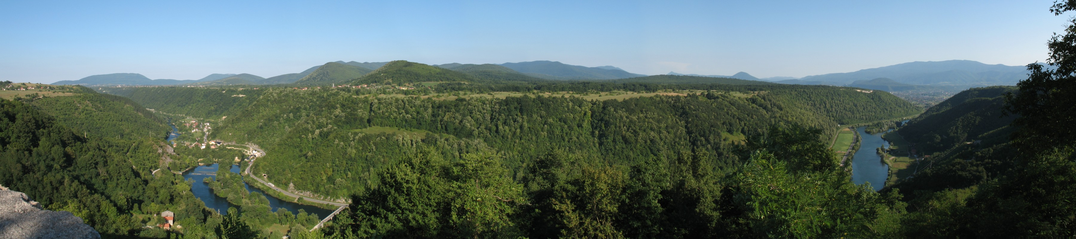 Blick von Brekovica auf die Landschaft im nordwestlichen Bosnien, Fluss Una, Bihać rechts im Hintergrund